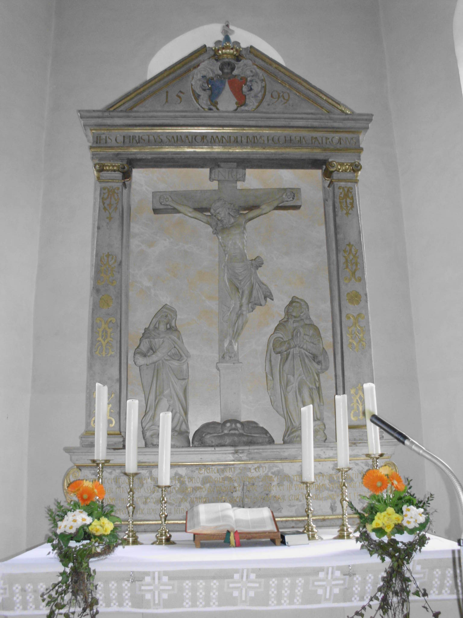 Absberg (Landkreis Weißenburg-Gunzenhausen, Bayern), Christus-Kirche, Spätrenaissance-Altar